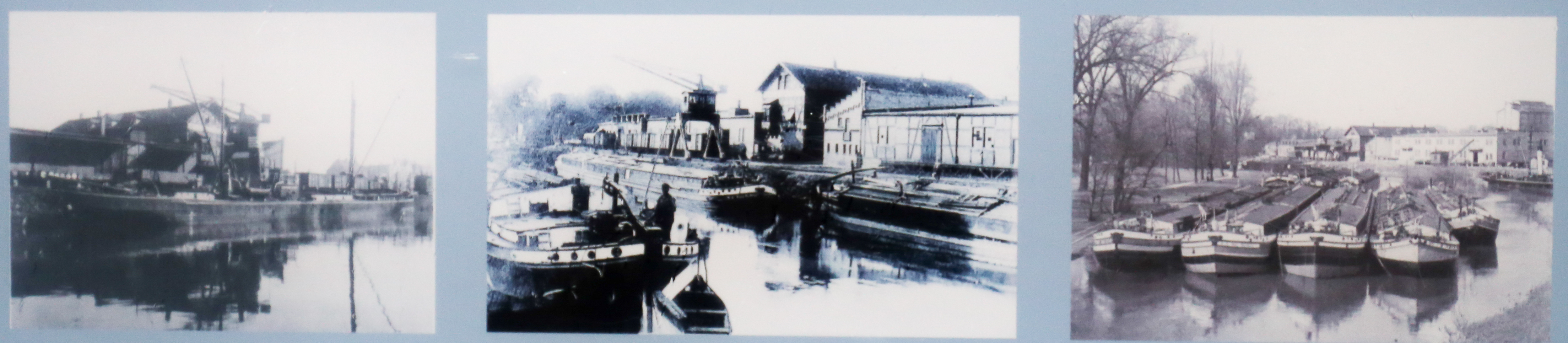 Ausschnitt von File:2019-01 Halle (02) Hafenbahnstraße.jpg